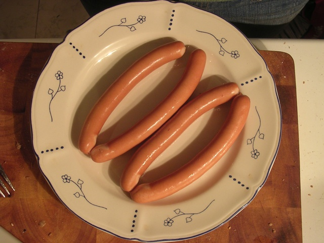 Plato don Salchichas típicas Frankfurter